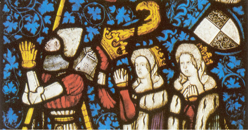 Albrecht III. Habsburský, AlžbětaLucemburská a Beatrix Norimberská